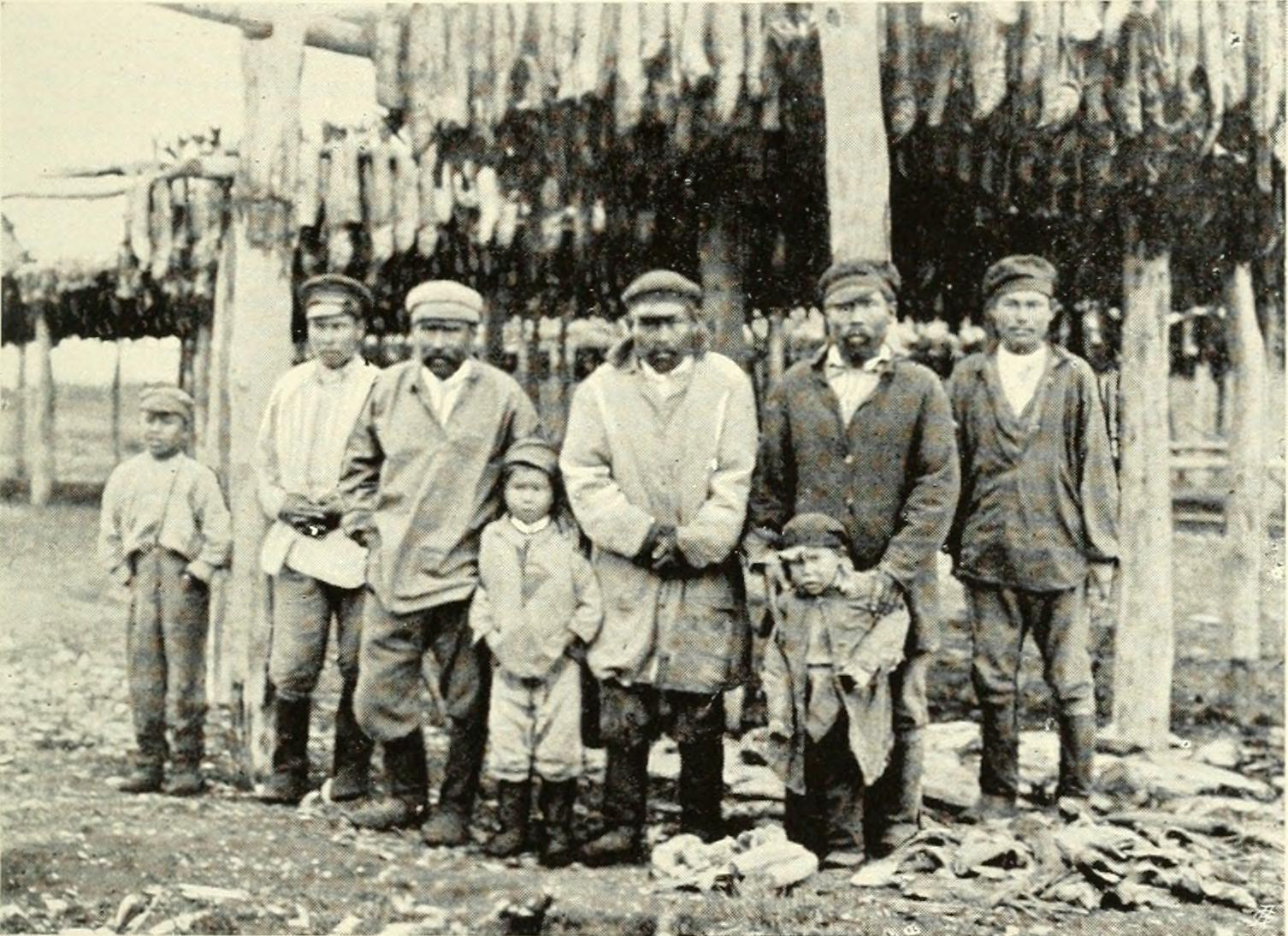 A GROUP OF KAMCHADALES AT NATCHIKI